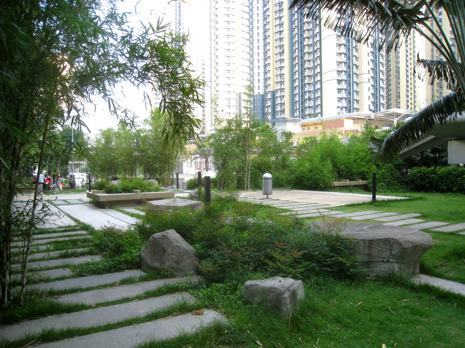 Kwai Chung Estate Phase 4 Garden